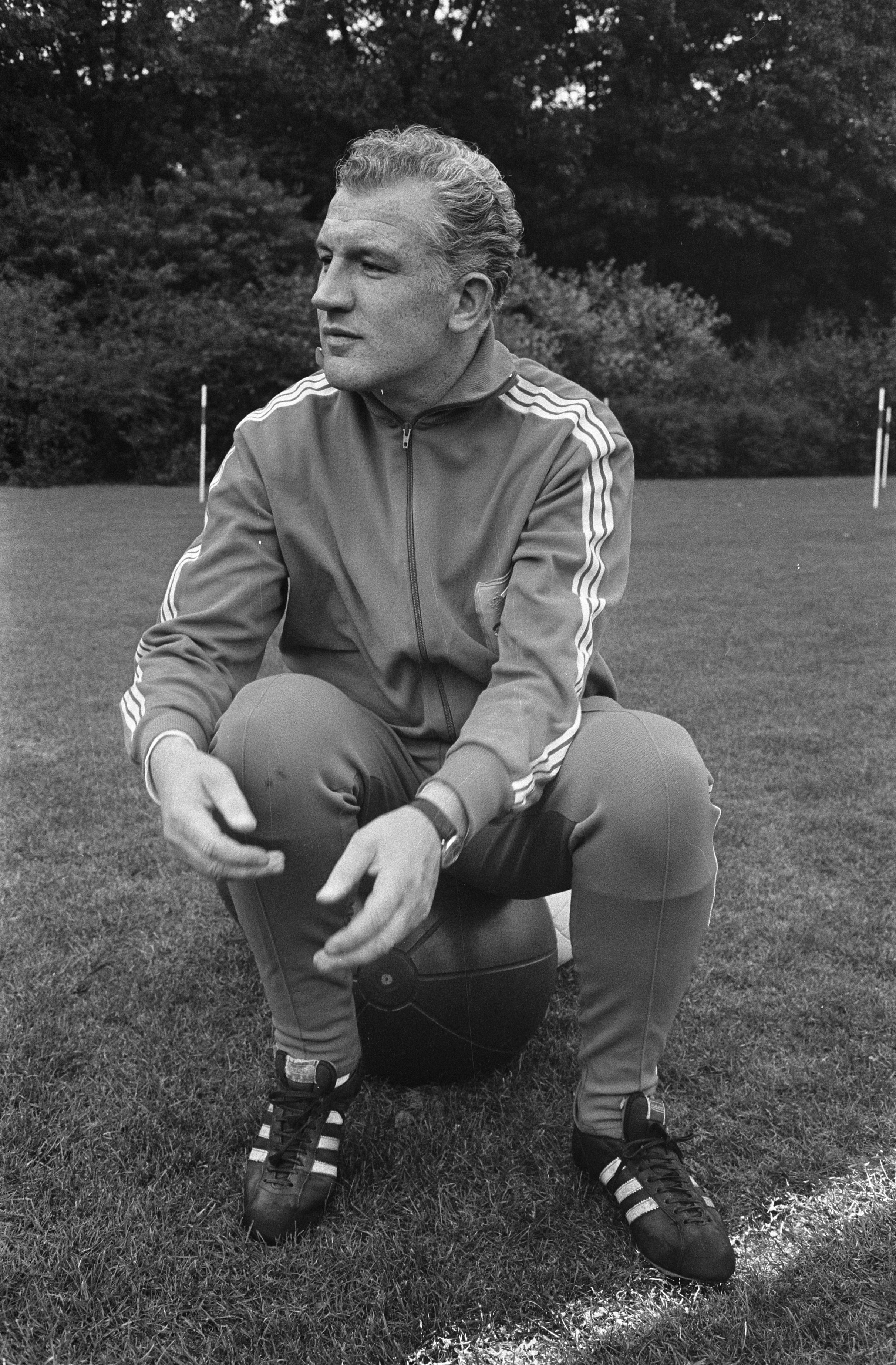 Entraînement de l'équipe néerlandaise de football à Zeist. Photographie de l'entraîneur Georg Kessler.